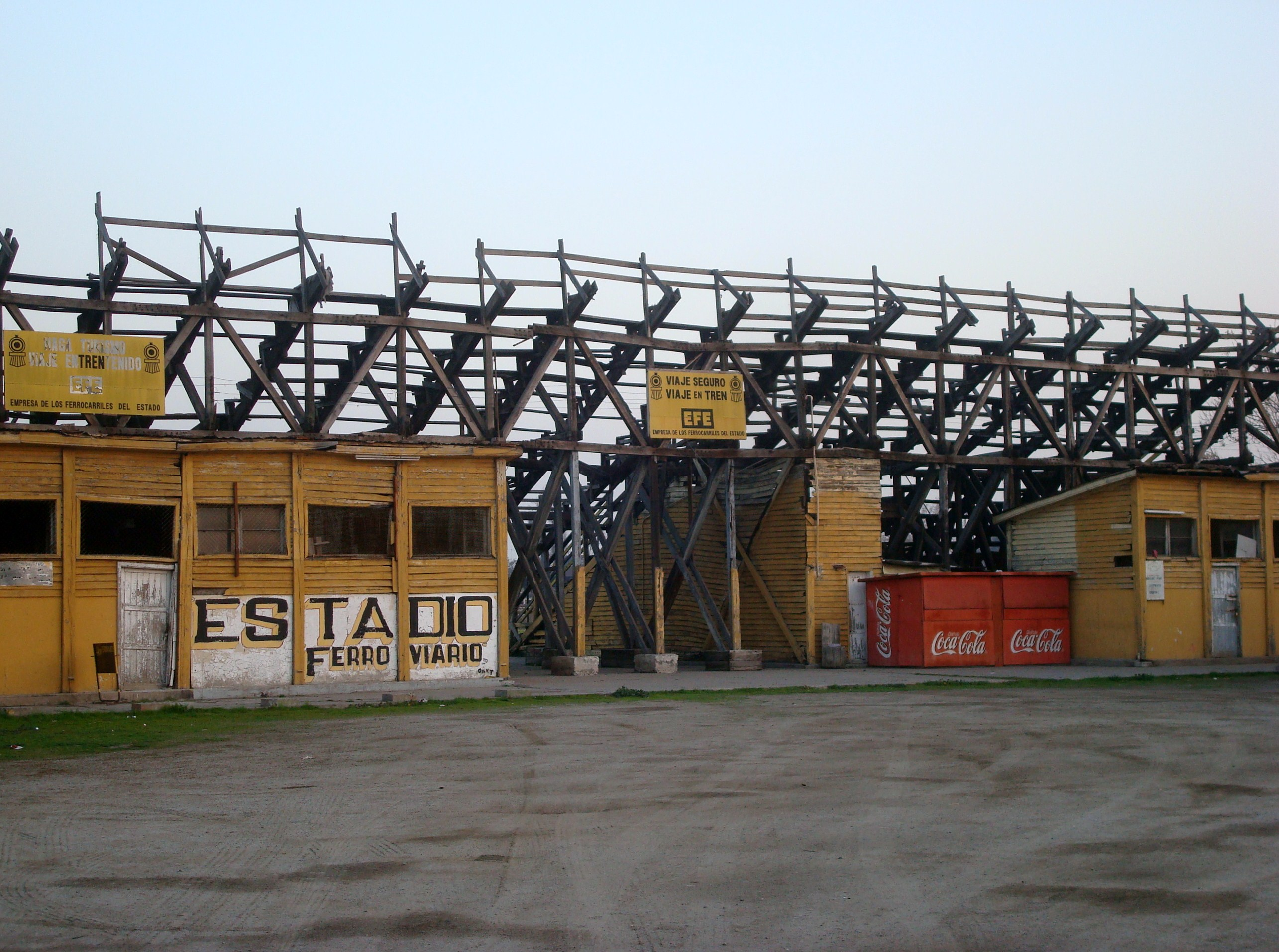 Estadio San Eugenio, Estación Central, Santiago de Chile